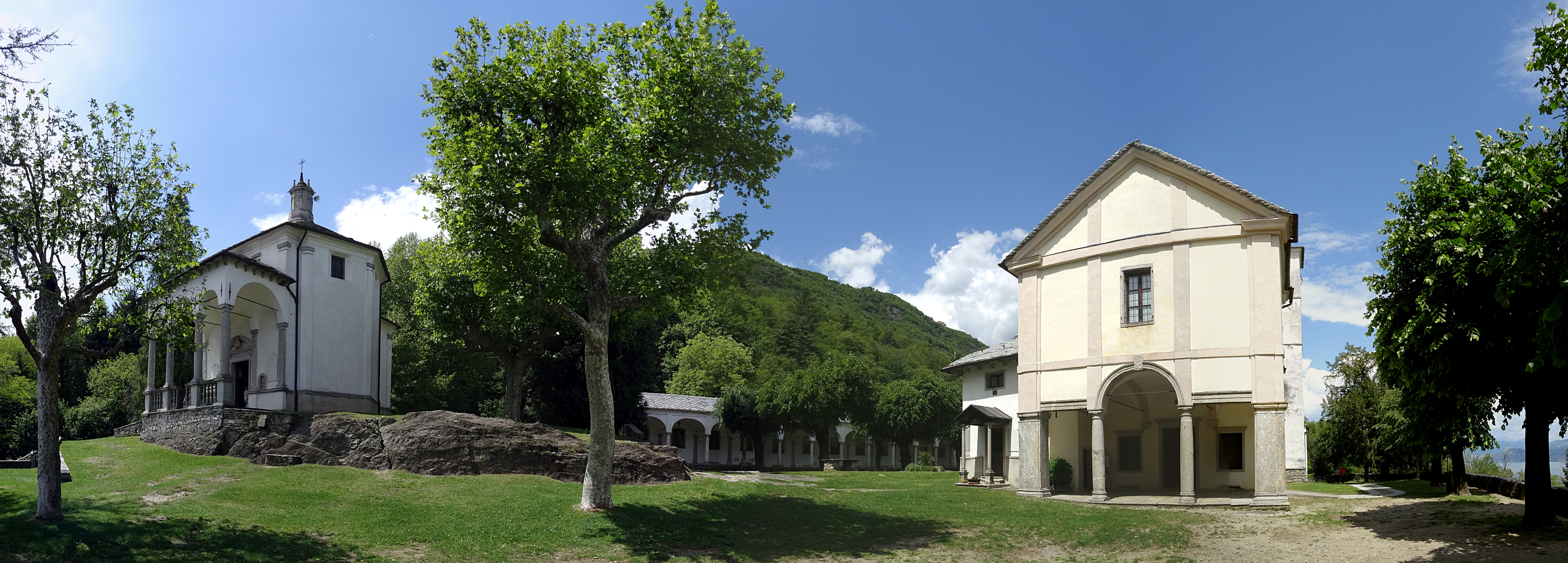 Sacro Monte della San Trinità di Ghiffa